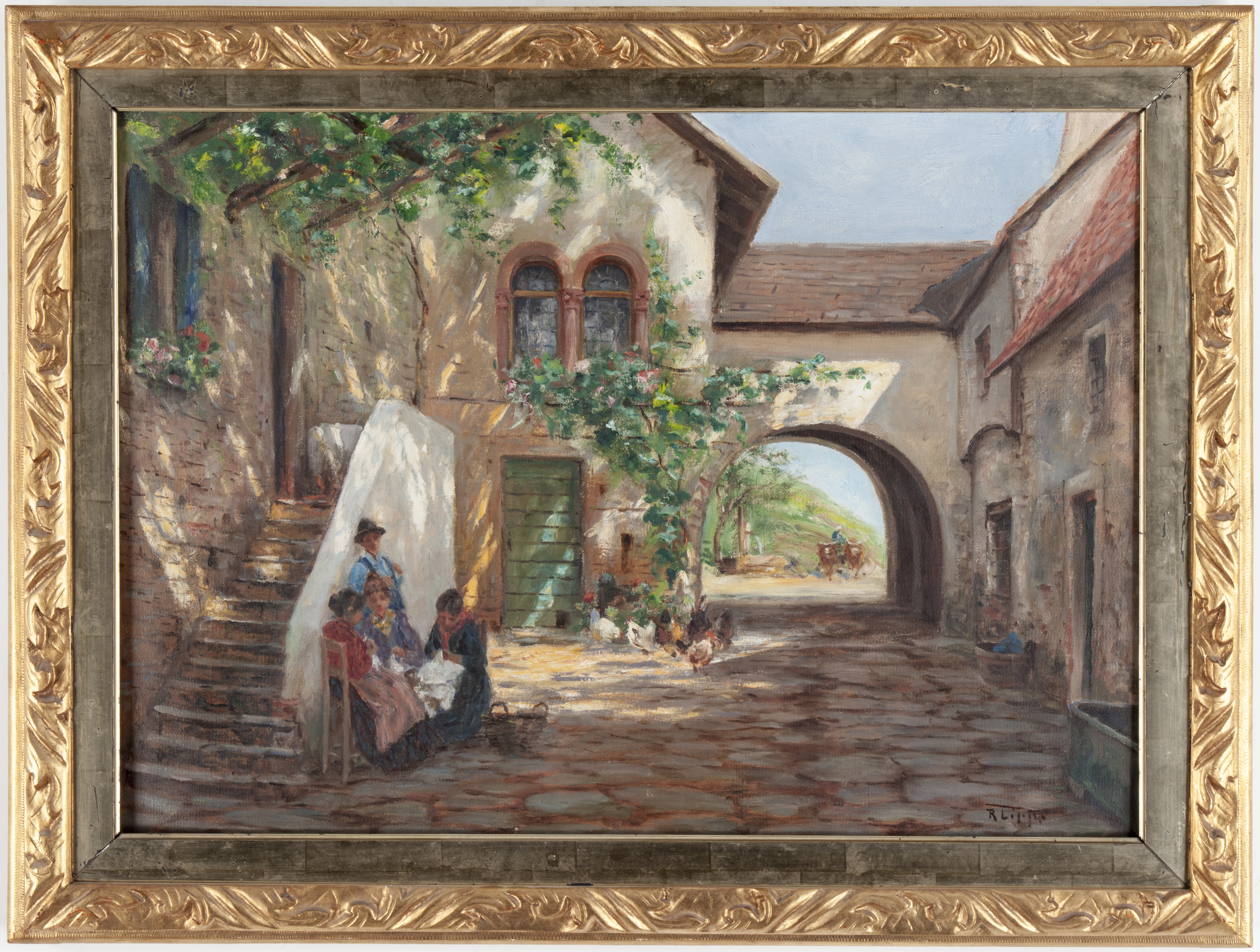 Hof im Südtirol